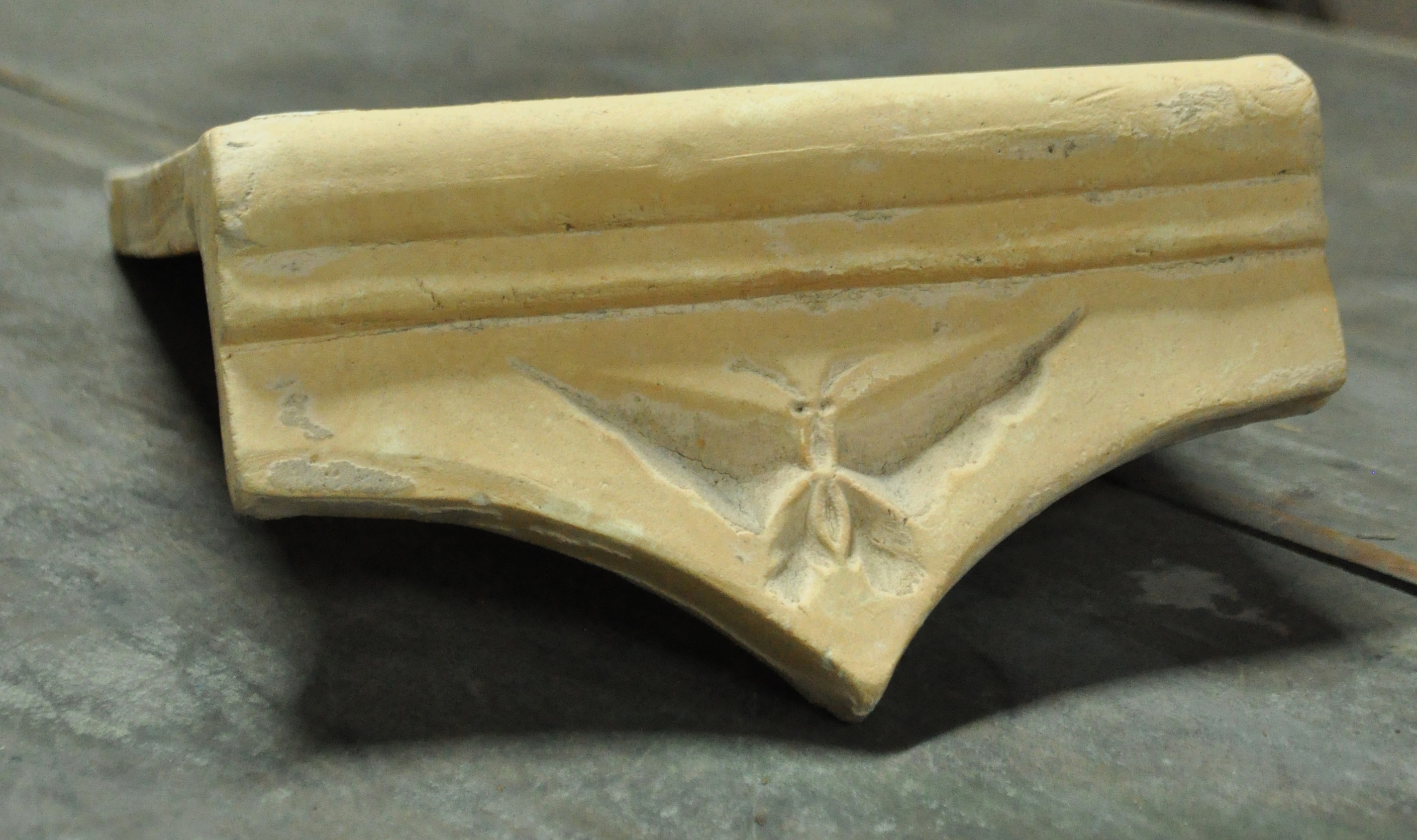 俊工事は屋根も、久田吉之助の焼いた陶製の平瓦であった。屋根の端の部分には蝶が彫られていた。